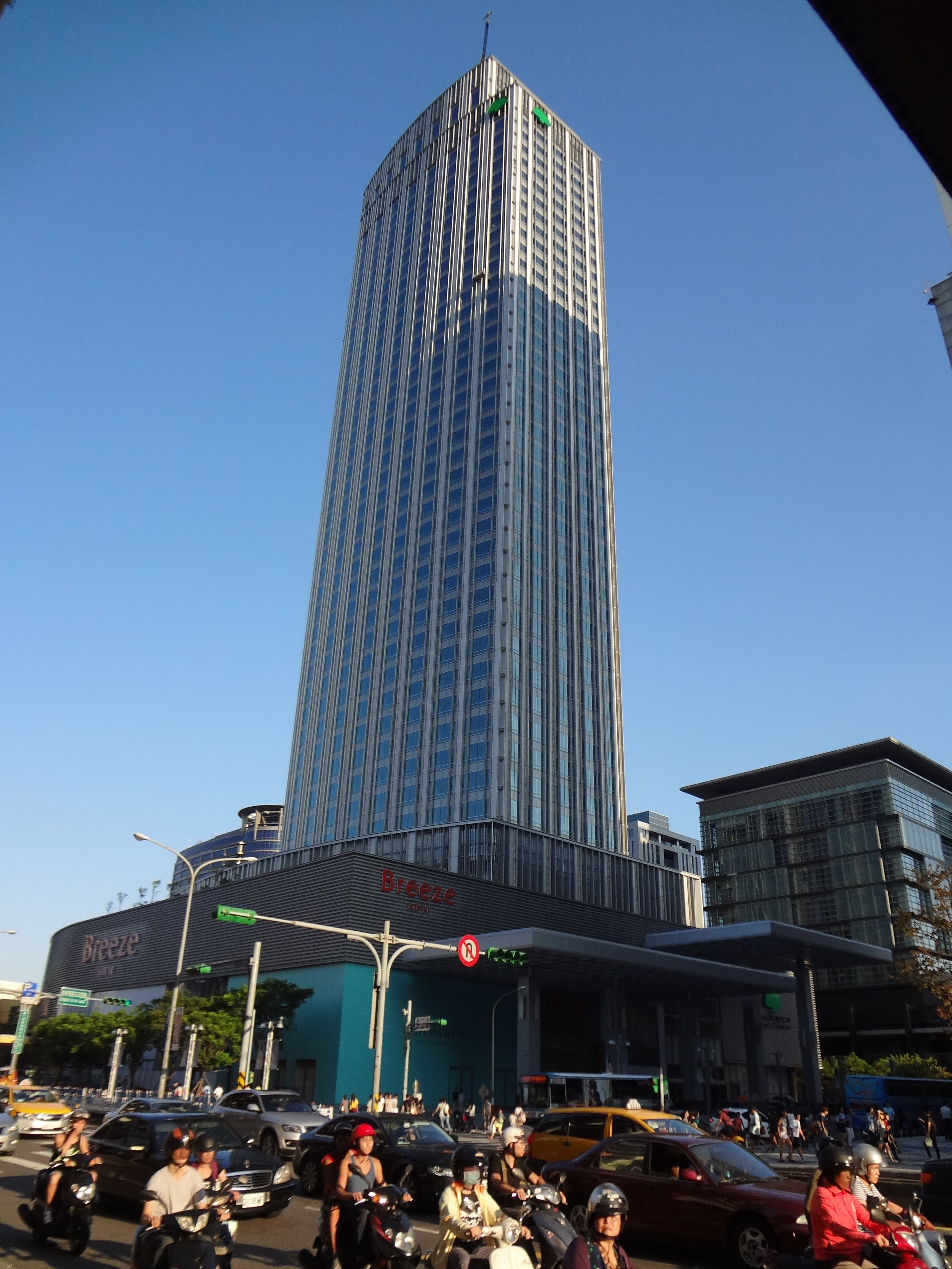 國泰置地廣場，位於臺北市信義區忠孝東路五段68號。微風信義設址於此。